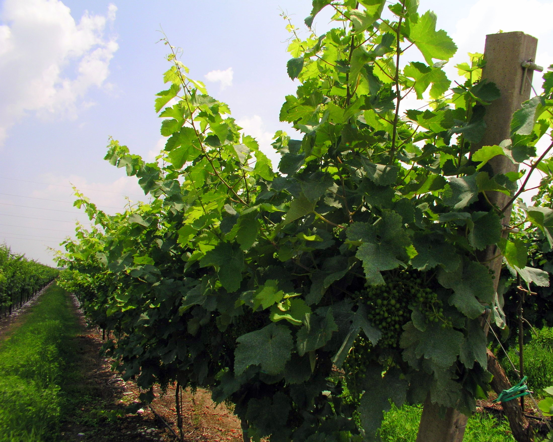 Vitigni di glera (prosecco) presso le Grave di Papadopoli.